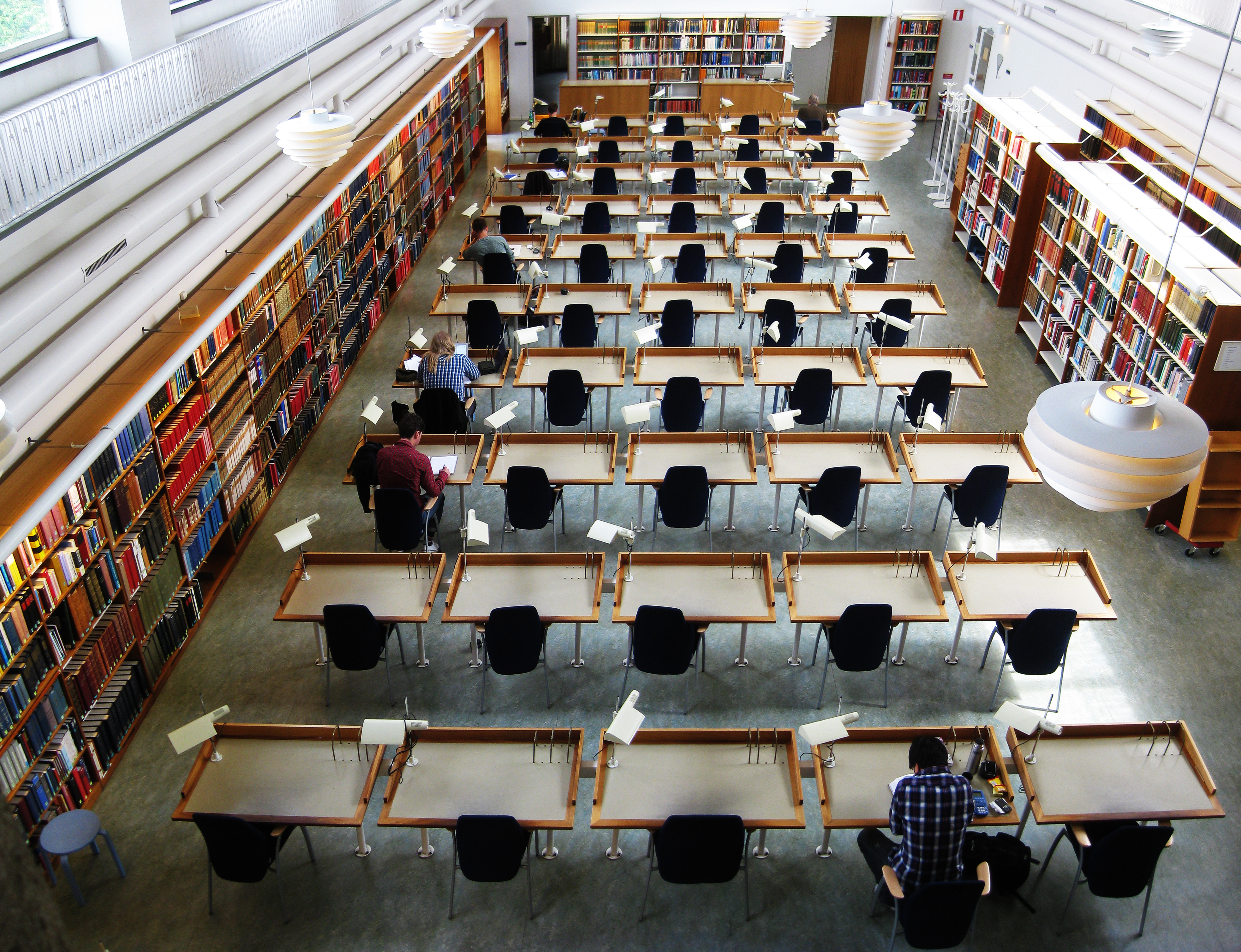 Göteborgs universitetsbiblioteks läsesal